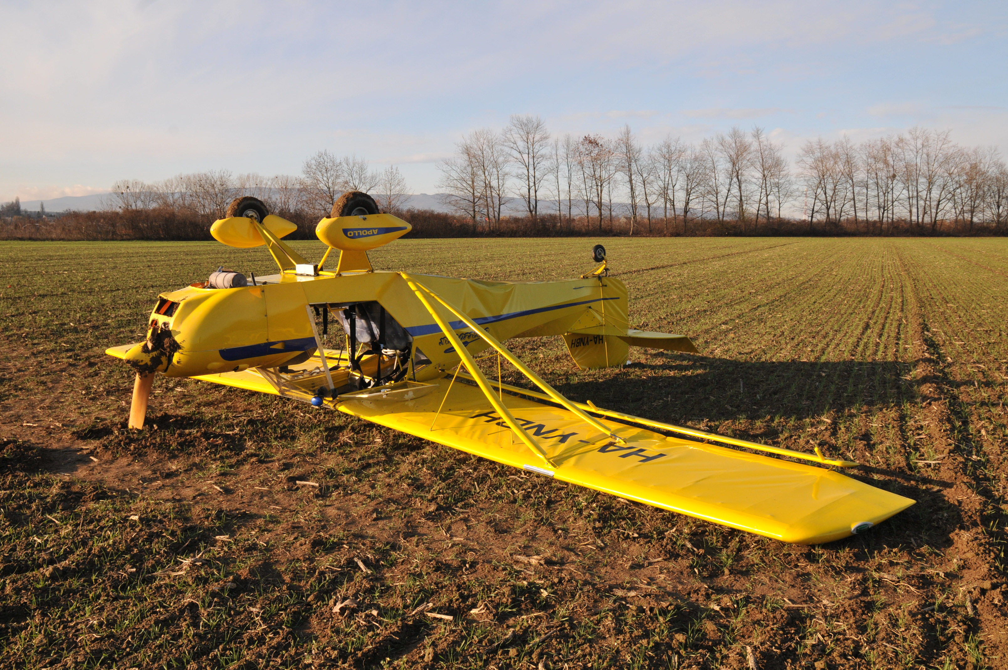 A Szombathelyről felszállt gép motorja leállt, a pilóta egy szántóföldön tette le a gépet, ami a felázott talajon átfordult. Fotó: Tánczos Mihály / 112Press